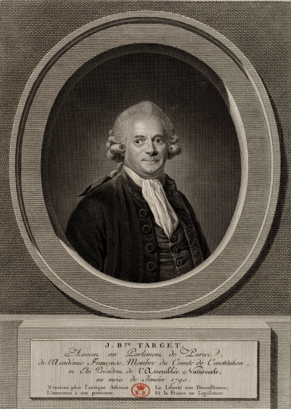 Guy-Jean-Baptiste Target (1733-1806), magistrat et député français